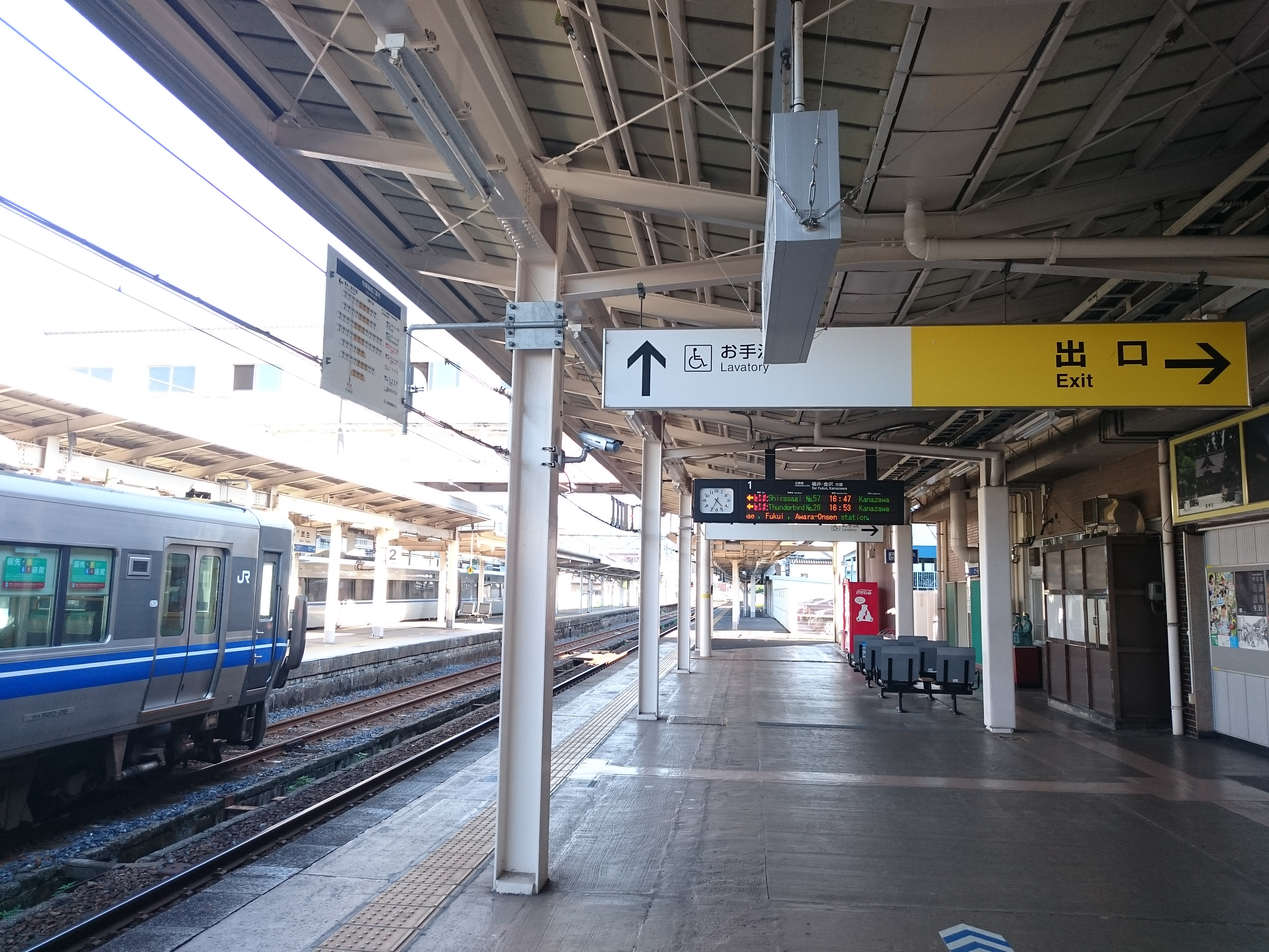 武生駅の1番のりば Sony Xperia Z3